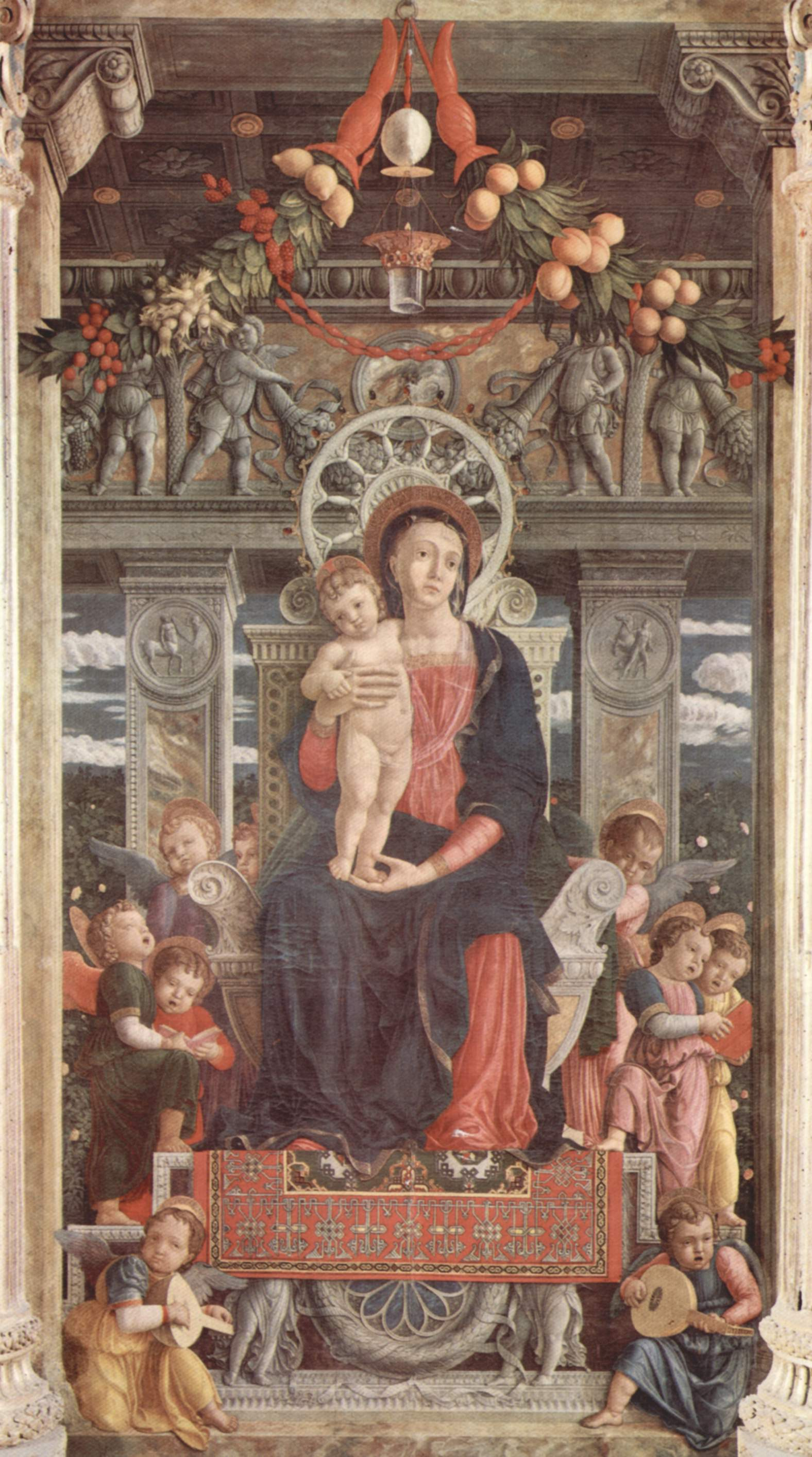 retable du maître-autel de la basilique San Zeno de Vérone